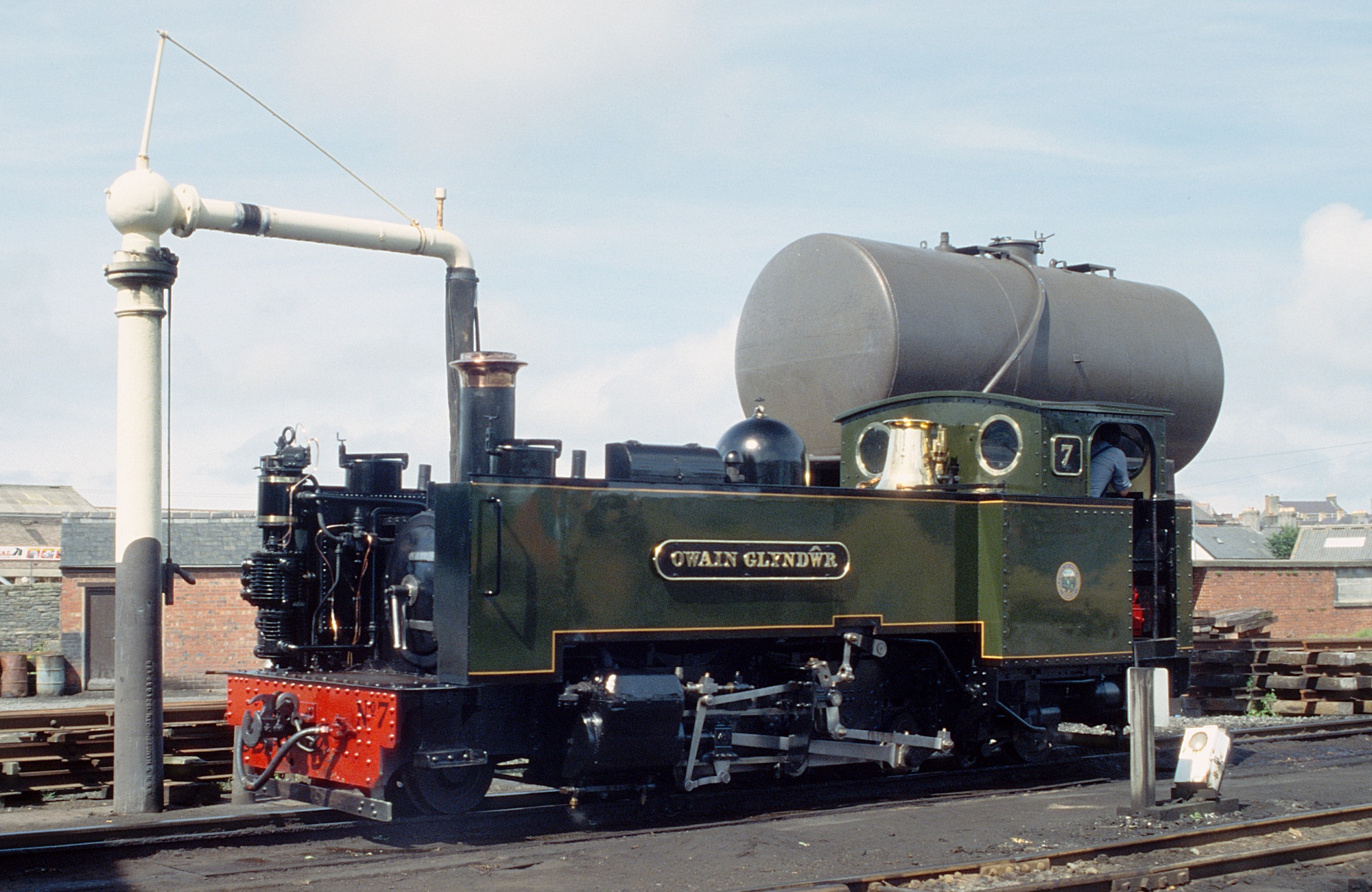 en: Vale of Rheidol Railway No. 7 Owain Glyndŵr at Aberystwyth depot, taking water and oil. cy: Rheilffordd Dyffryn Rheidol rhif 7 Owain Glyndŵr yng nghanolfan Aberystwyth, yn cymryd dŵr ac olew. de: Vale of Rheidol Railway No. 7 Owain Glyndŵr ergänzt im Depot von Aberystwyth ihre Wasser- und Ölvorräte.